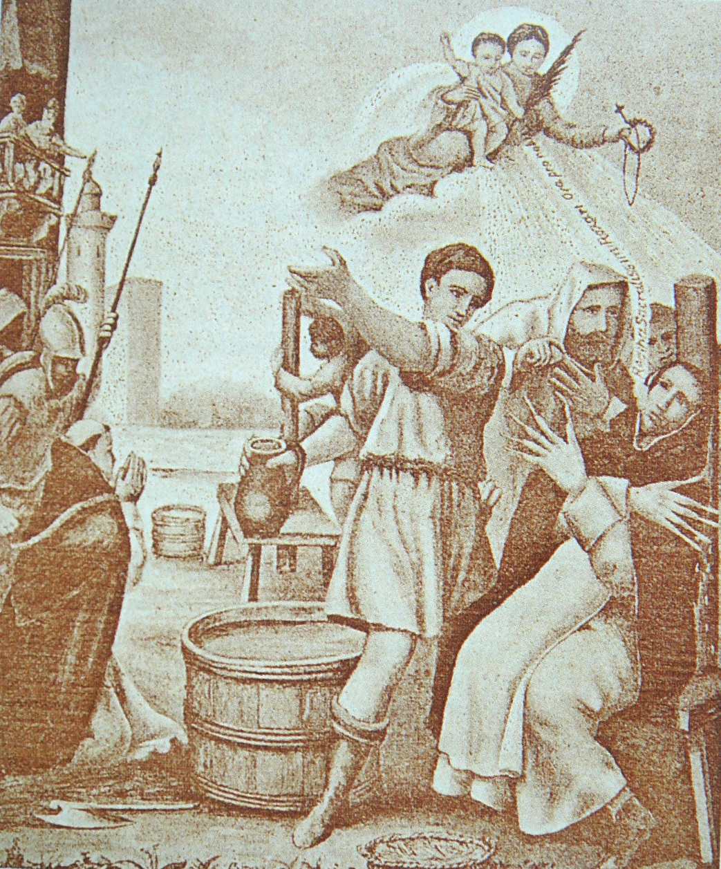 Martyrdom Of Guillaume Courtet